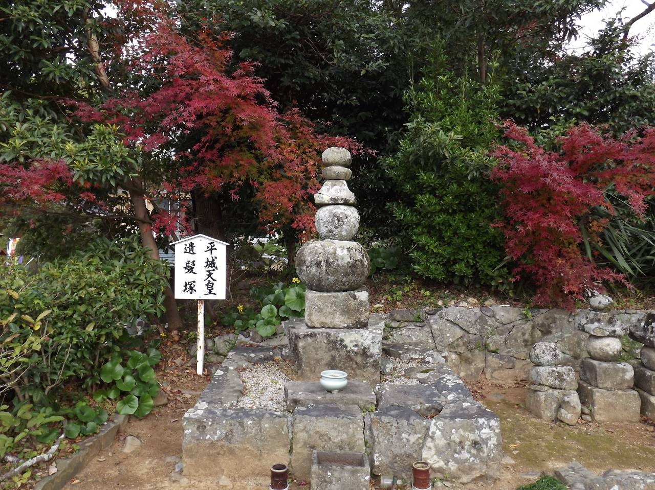 観自在寺の平城天皇剃髪塚